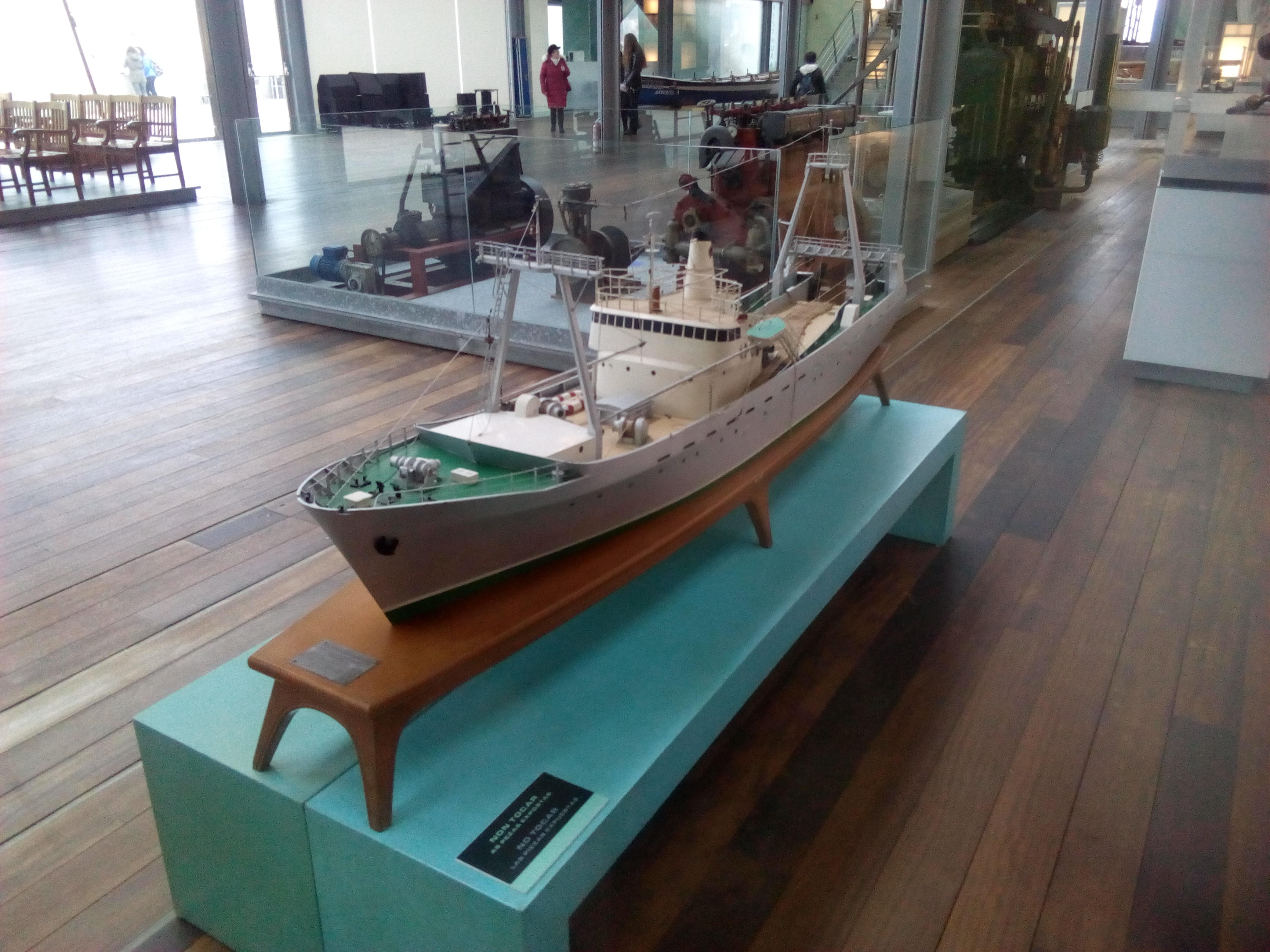 maqueta barco